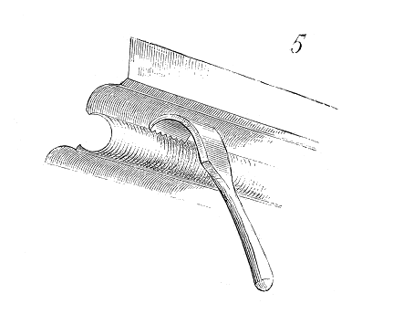 ... Au XIVe siècle, ces profils acquièrent souvent une telle ténuité, que la bretture ne saurait les dégager; alors on emploie la ripe, sorte de ciseau recourbé et dentelé très-fin, et c'est perpendiculairement à la moulure que cet outil est employé (fig. 5). Ainsi le tailleur de pierre modèle son profil, comme le ferait un graveur, pour faire sentir les diverses courbures ...